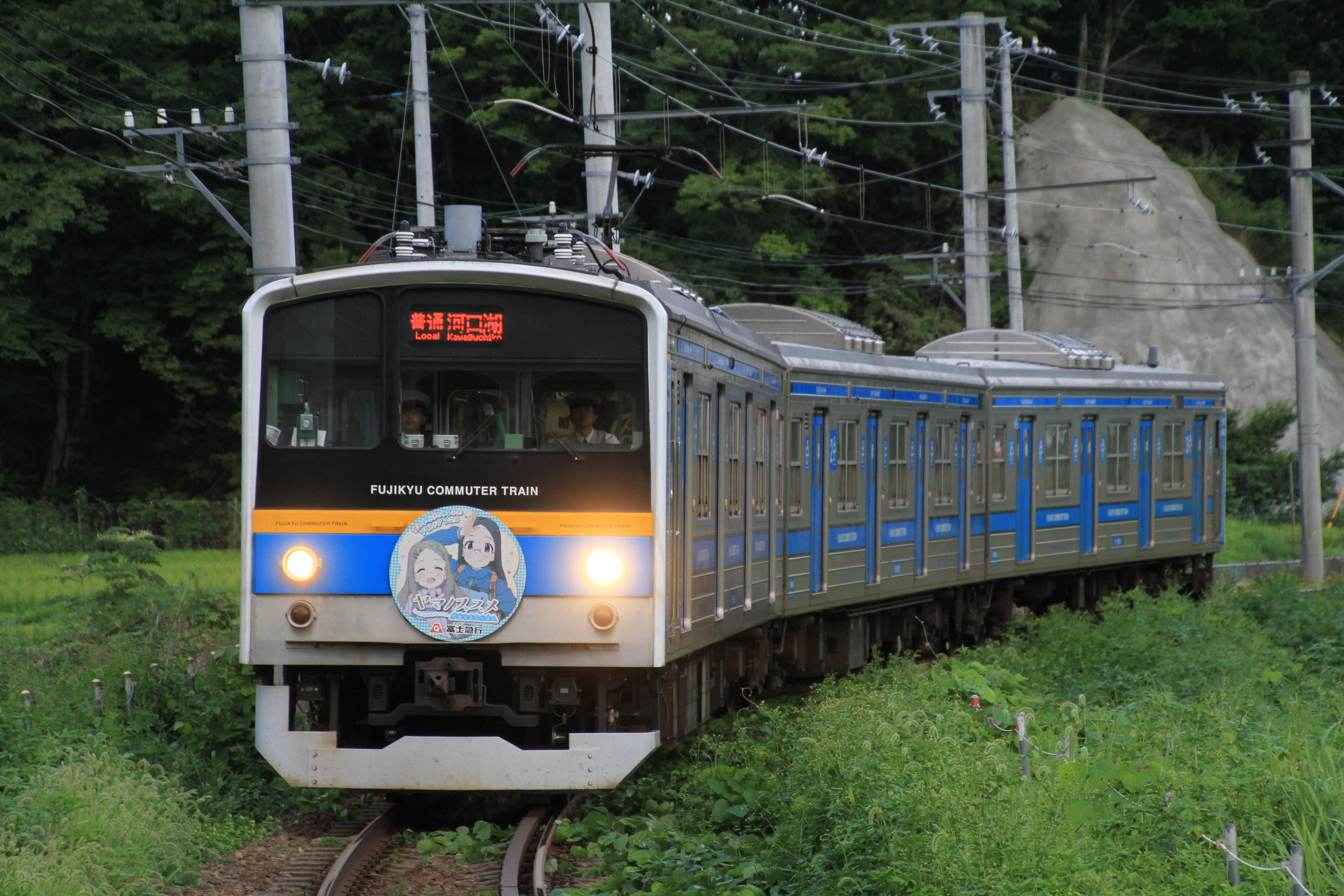 ヤマノススメ号@三つ峠～寿